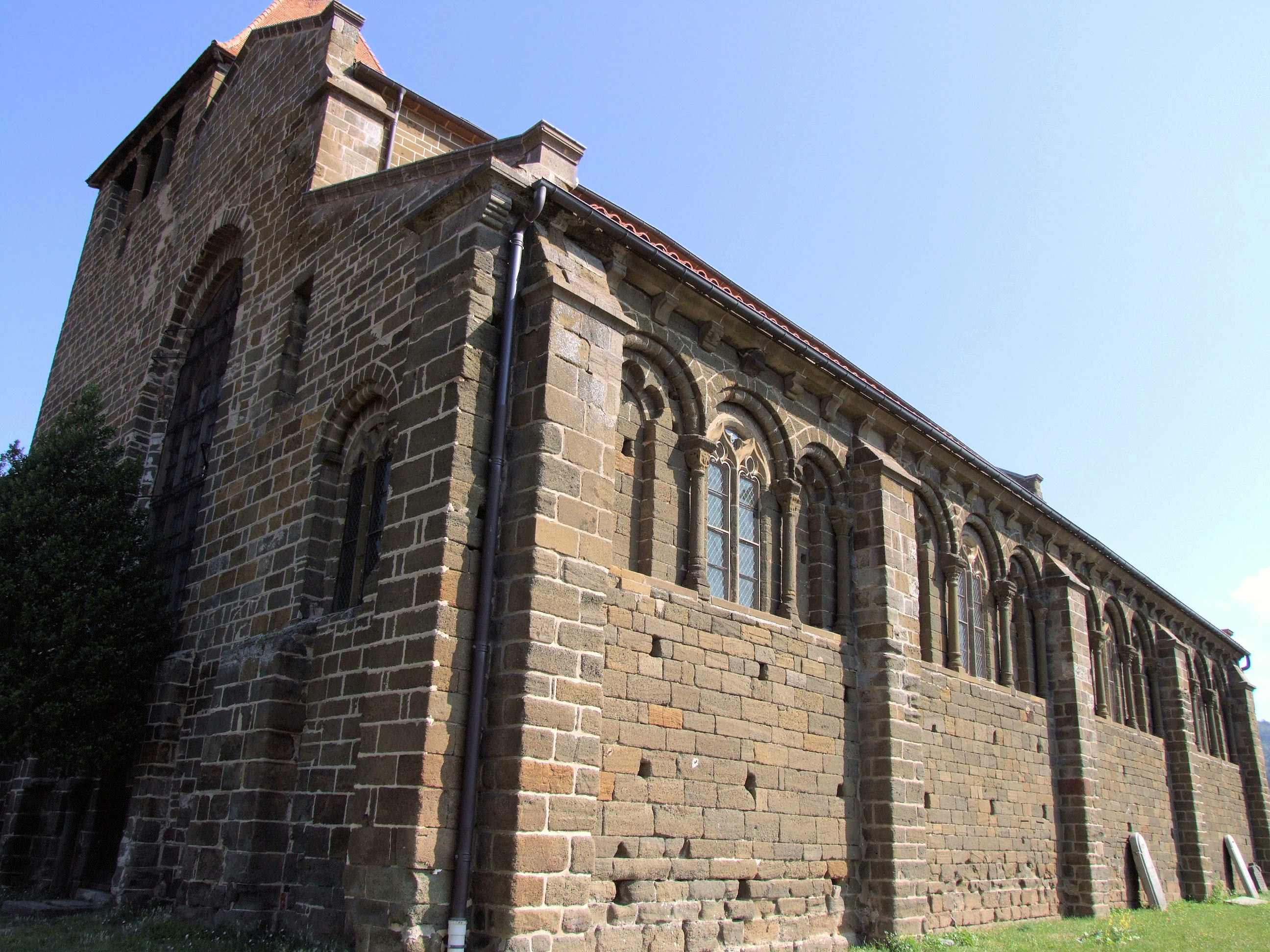 Chanteuges - Prieuré - Ancienne abbatiale Saint-Marcellin